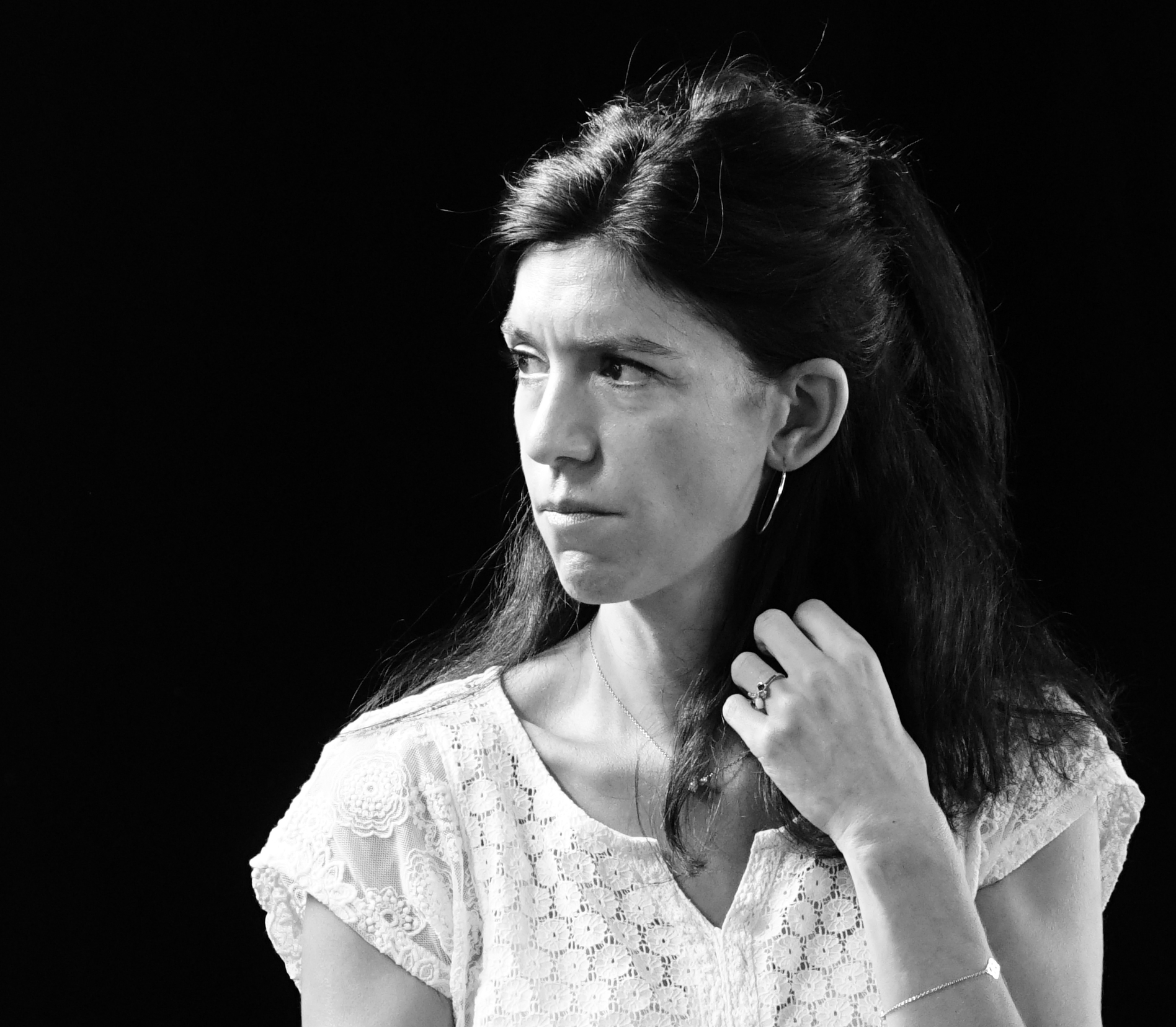 le livre sur la place stan en 2018.